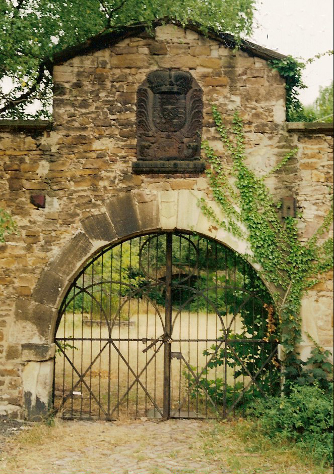 Bildbeschreibung: Das nordwestliche Tor des Messinghof (Kassel) Quelle: eigene Photographie